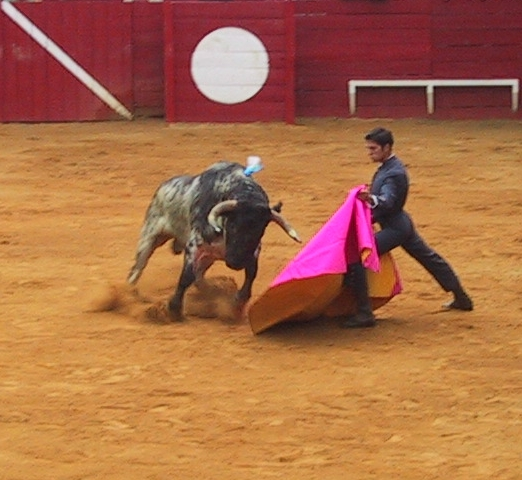 Rafael Cañada à Saint-Perdon (Landes, France)